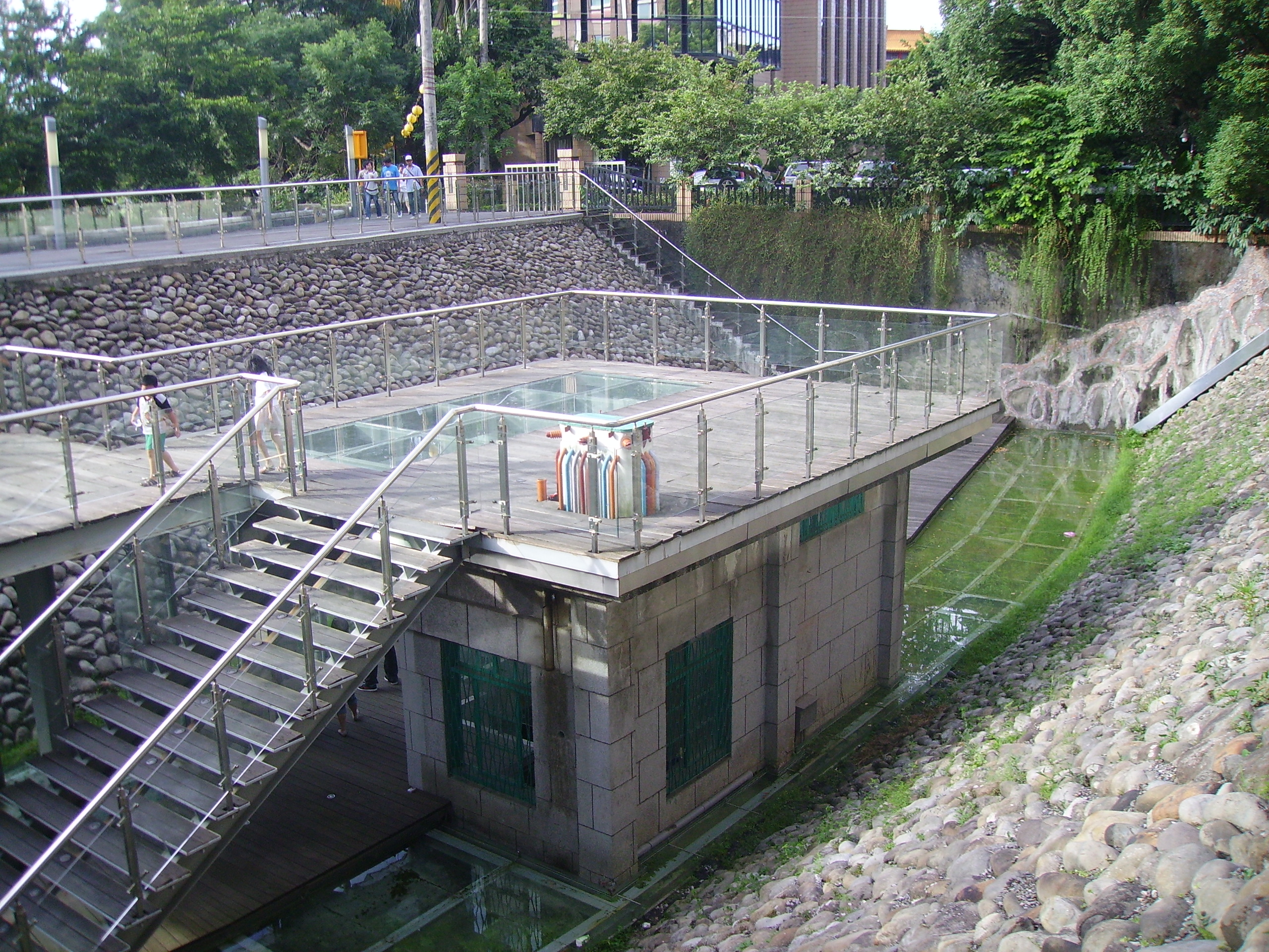 瑠公玔水門抽水站。